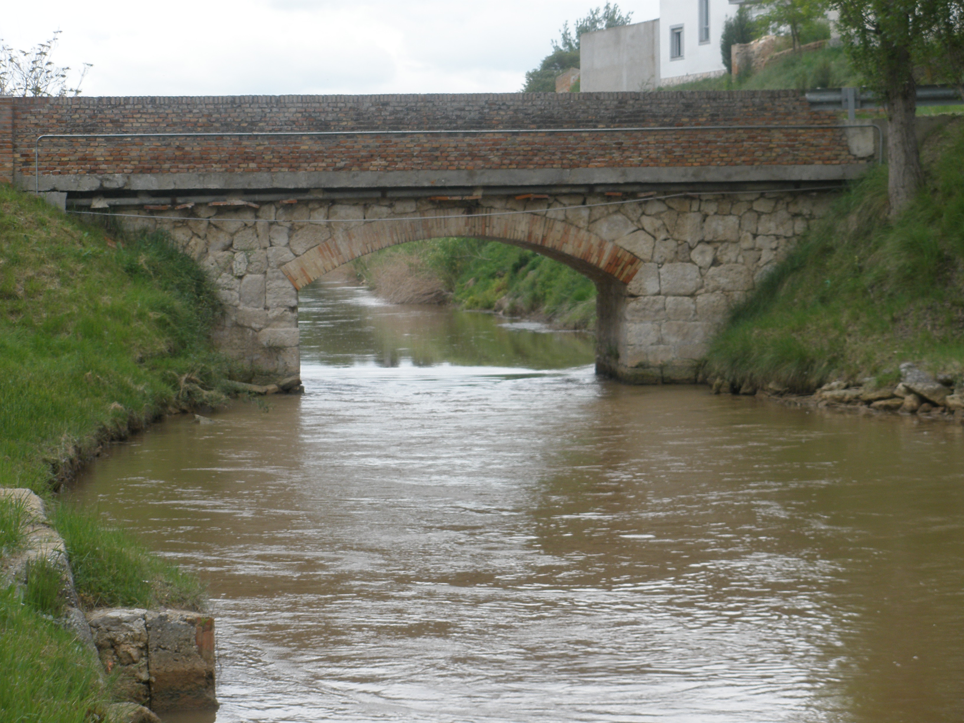 fotografía del canal del Duero, tomada en Sardón de Duero ,Valladolid ,España